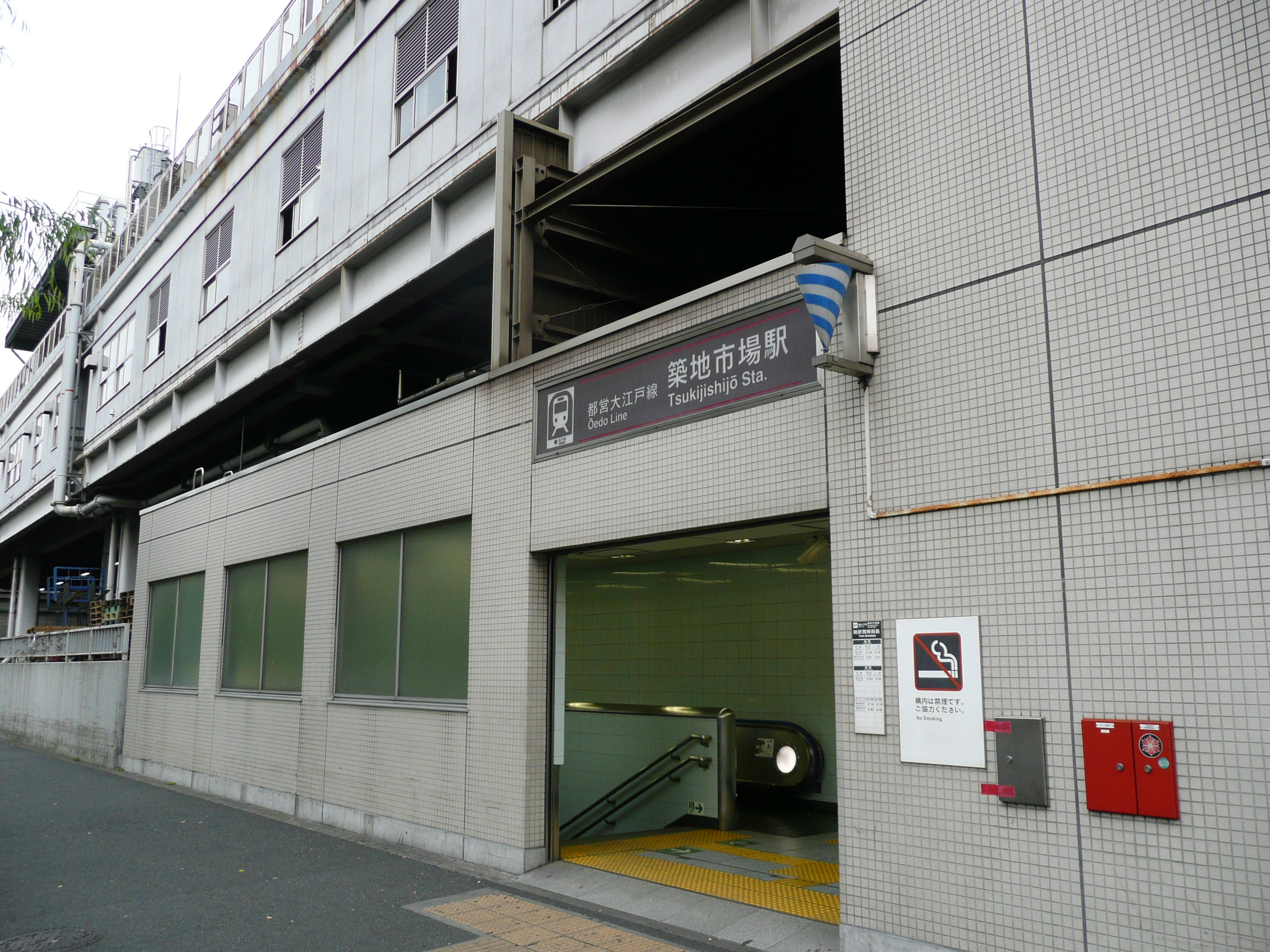 築地市場駅A1出入口